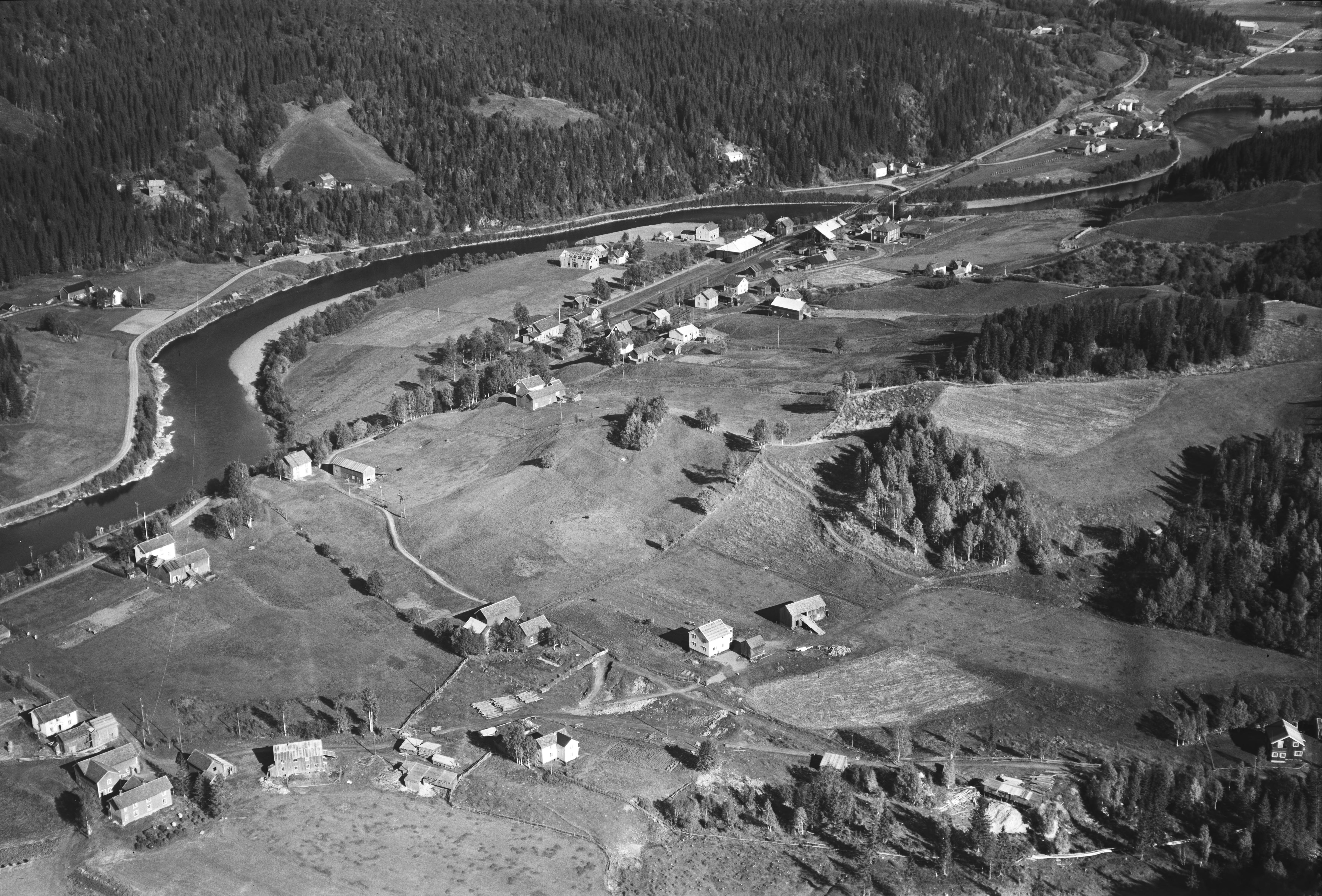 Gudå i Meråker kommune i Nord-Trøndelag fylke.